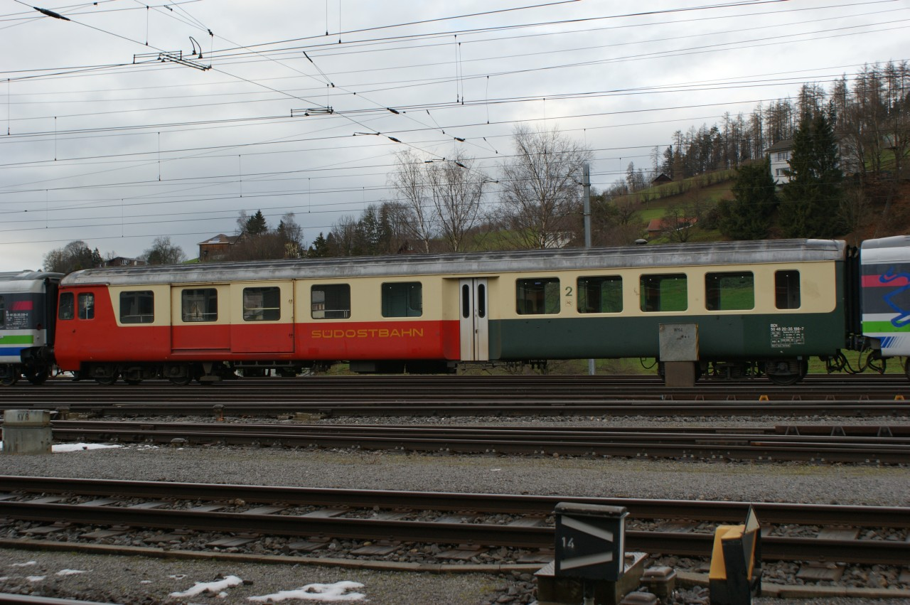 BDt 198 ex 971 ex 292 der Südostbahn, ex BD 234 ex BT BD 517, als Reservefahrzeug für den Voralpenexpress abgestellt in Herisau.